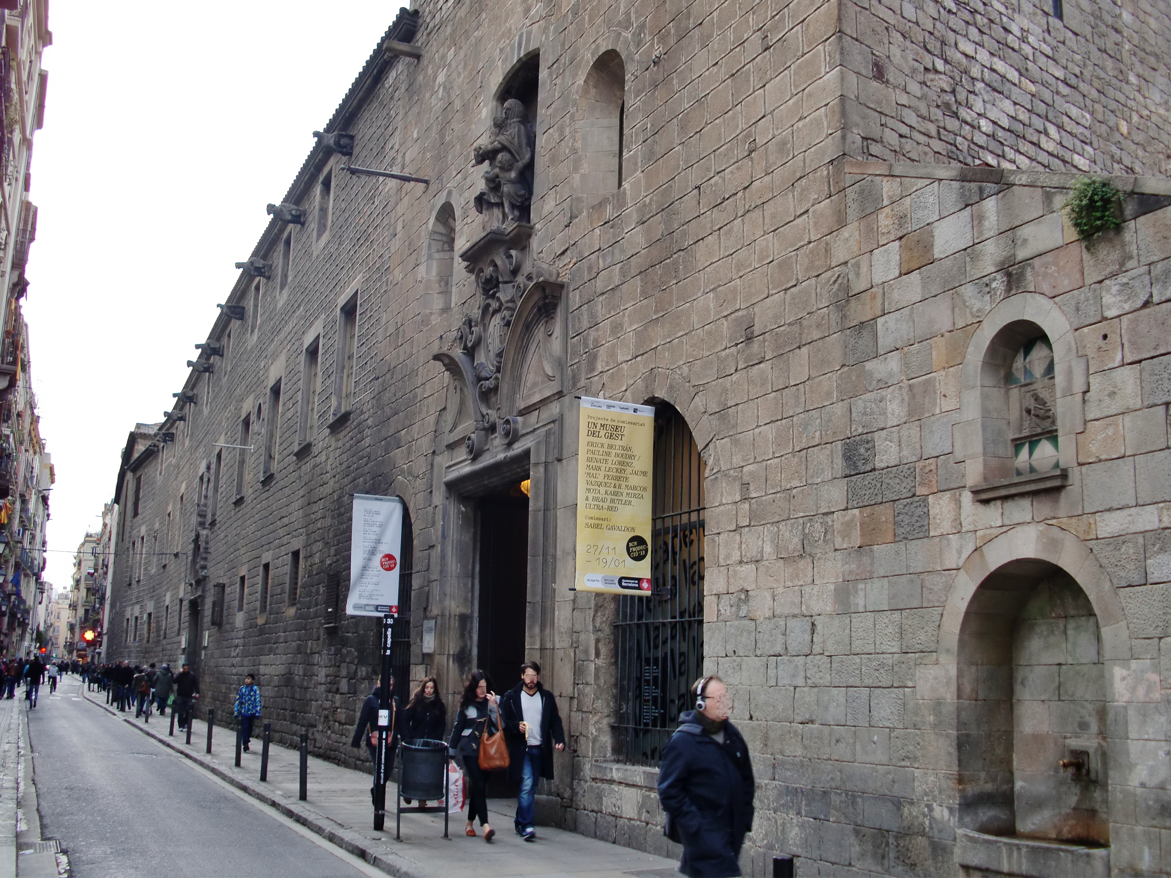 Antic Hospital de la Santa Creu, Raval, Barcelona